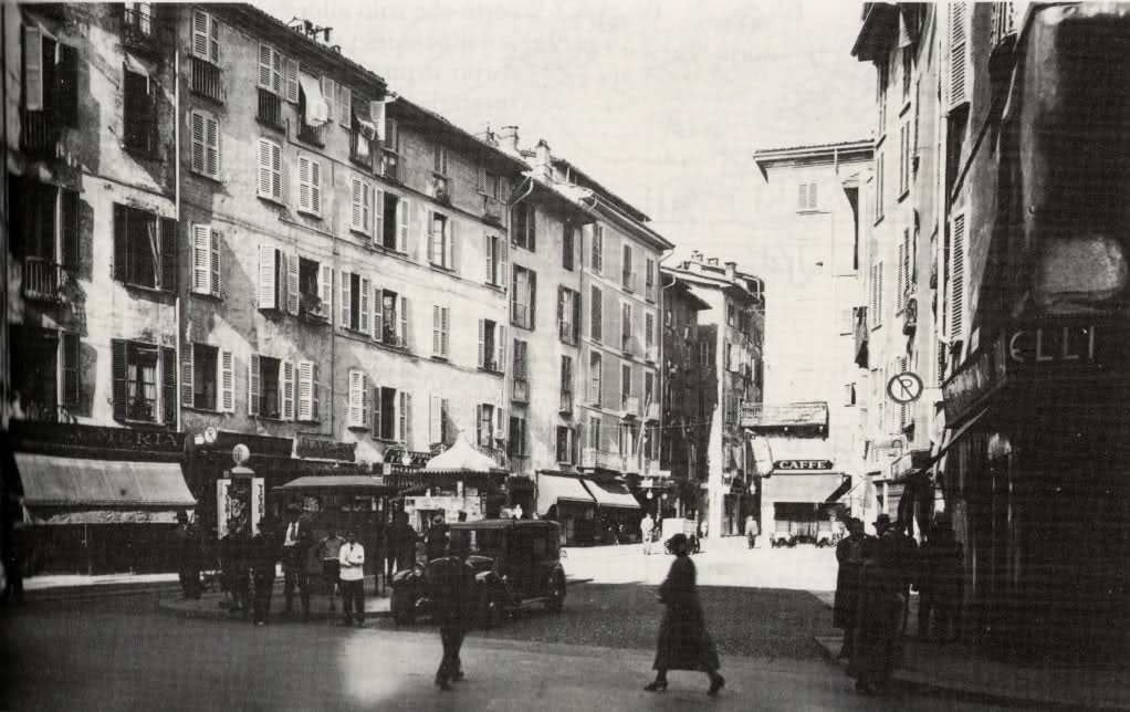 Panoramica del Bottonuto di Milano, quartiere oggi scomparso.